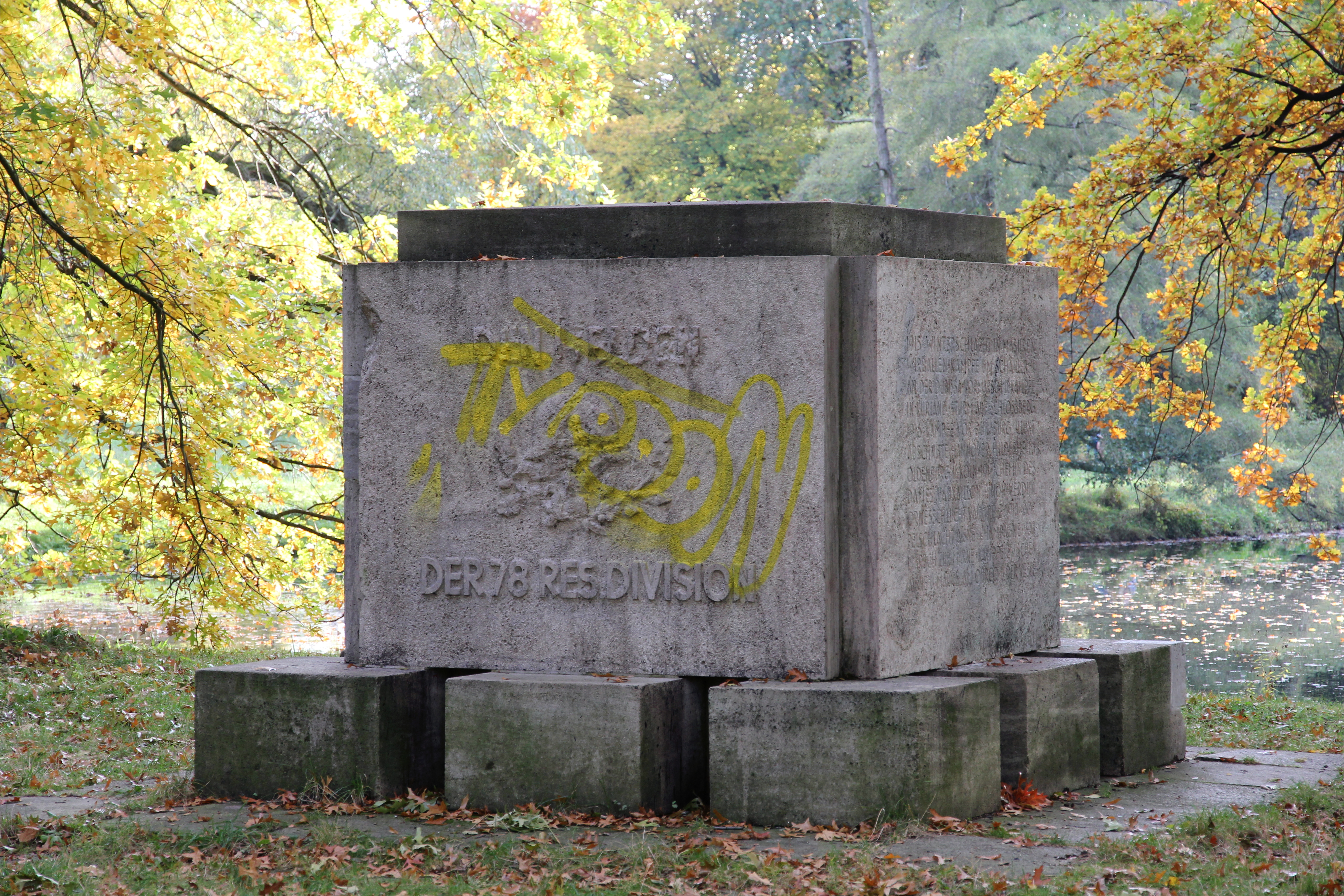 Kriegerdenkmal im Georgengarten in Hannover für die Gefallenen der 78. Reserve-Division Inschrift auf der Vorderseite: DEN HELDEN DER 78. RES.DIVISION Inschrift auf der Rückseite: IHR LEBT Inschrift auf der rechten Seite (sowie es noch erkennbar ist): 1915 WINTERSCHLACHT IN MASUREN WIR BALLEN KÄMPFE UM SCHAULEN U. AN DER DUBISSA – VORMARSCH U. KÄMPFE IN KURLAND-STURM AUF SCHLOSSBERG 1916 KÄMPFE VOR DÜNABURG ILLUXT ABSCHNITTE HANNOVER HILDESHEIM OLDENBURG U. KÖLN – 1917 CHEMIN DES DAMES VAUXAILLON PINON VERDUN ORNESSCHLUCHT VAUXKREUZ – 1918 DOP PELSCHLACHT AISNE-CHAMPAGNE VOR MARSCH ZUR MARNE – KÄMPFE ZWISCHEN AISNE U. MARNE AM OURCO U. DER VESLE Inschrift auf der linken Seite (sowie es noch erkennbar ist; die ersten beiden Zeilen sind am Ende abgeschnitten, da bei der Vierung in dem Bereich die Schrift nicht ergänzt wurde): RES.INF.RT 258 259 260 RES. FELD. ARTL. REGT. 61 62 1.GARDE FUSSARTL.REGT.8 BATTR. RES.PION.KOMP 7. O-RADF. KOMP.78 – MINENWERFER KOMP.78 – RES-KAV.ABT.78 RES.FERNSPR.ABT. 4 87 – RES. SAN.KOMP 58 540 – RES.FELD. LAZ 107.108 FELDPOST STAF FELN U. KOLONEN DER 78 R.D. Die Festschrift zu Weihe des Kriegerdenkmals gibt an:[1] Material: fränkischer Muschelkalk Bildhauerarbeiten an der Vorderseite: Scheuernstuhl Hannover Entwurf und Bauleitung: Dr. Ing. Winkelmüller Ausführung: Fr. Meine